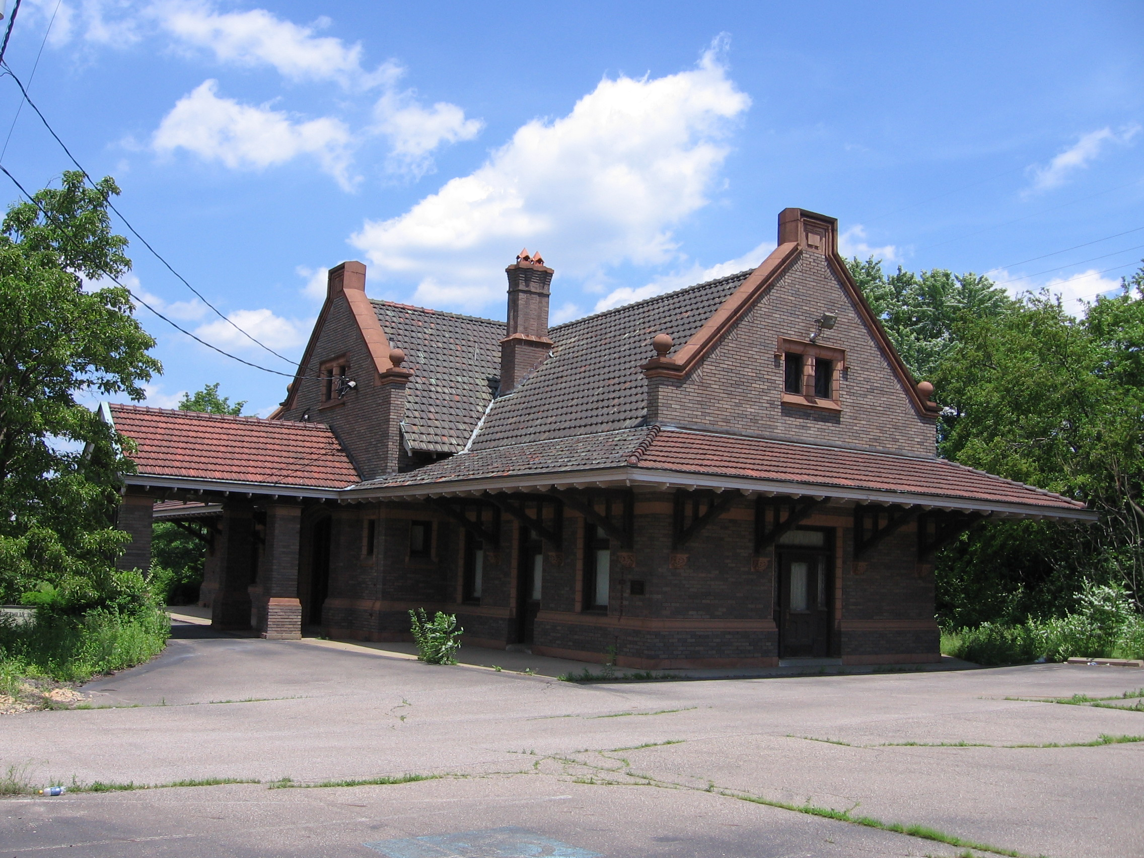 Aliquippa Station